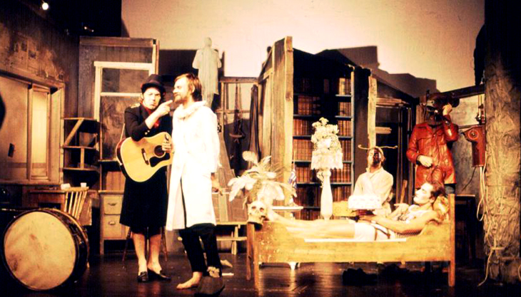 Höfundarréttur: Kristján Kristjánsson Mynd: Kristján Kristjánsson. Birt með leyfi: Kristján Kristjánsson.